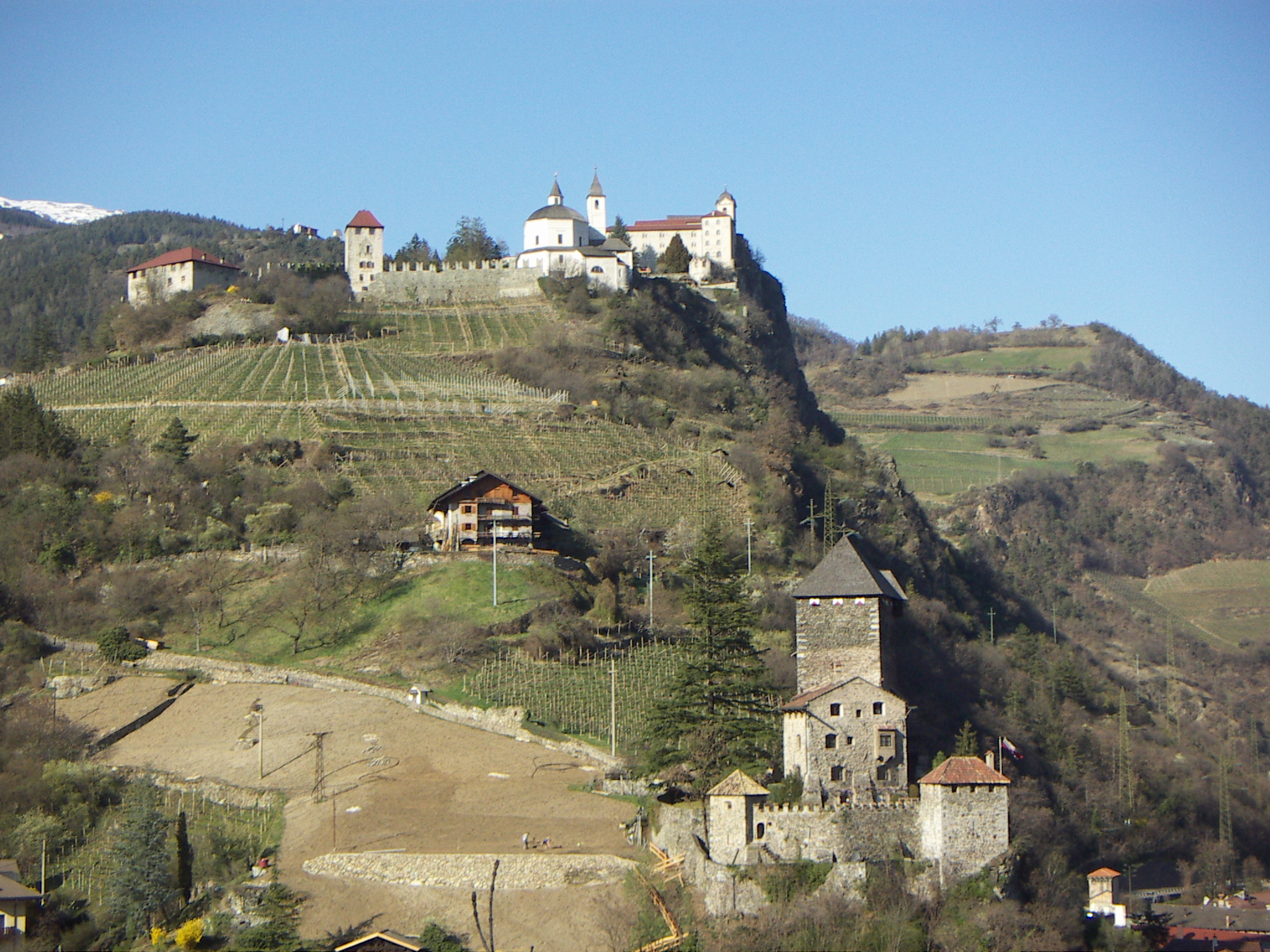 Burg Branzoll mit dem Säbener Berg oberhalb von Klausen in Südtirol dahinter. Gut erkennbar sind der Torturm mit der Ringmauer von Säben sowie die Liebfrauenkirche mit der Marienkapelle